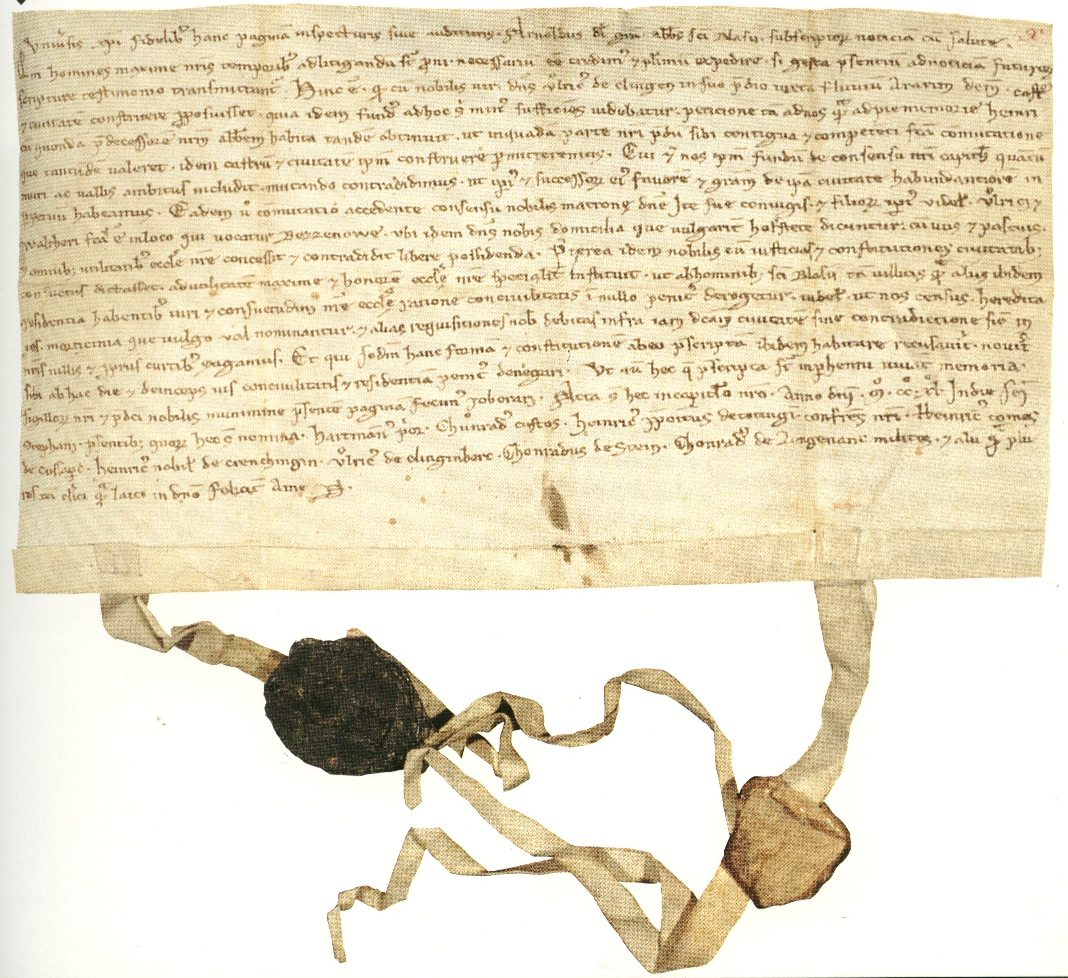 Tauschvetrag zwischen dem Kloster St. Blasien und dem Freiherr Ulrich von Klingen über Beznau und einen Hügel (die heutige Stadt Klingnau) Die Urkunde enthält auch die erste Urkundkundliche Erwähung des Ortes Totingen, dem heutigen Döttingen.